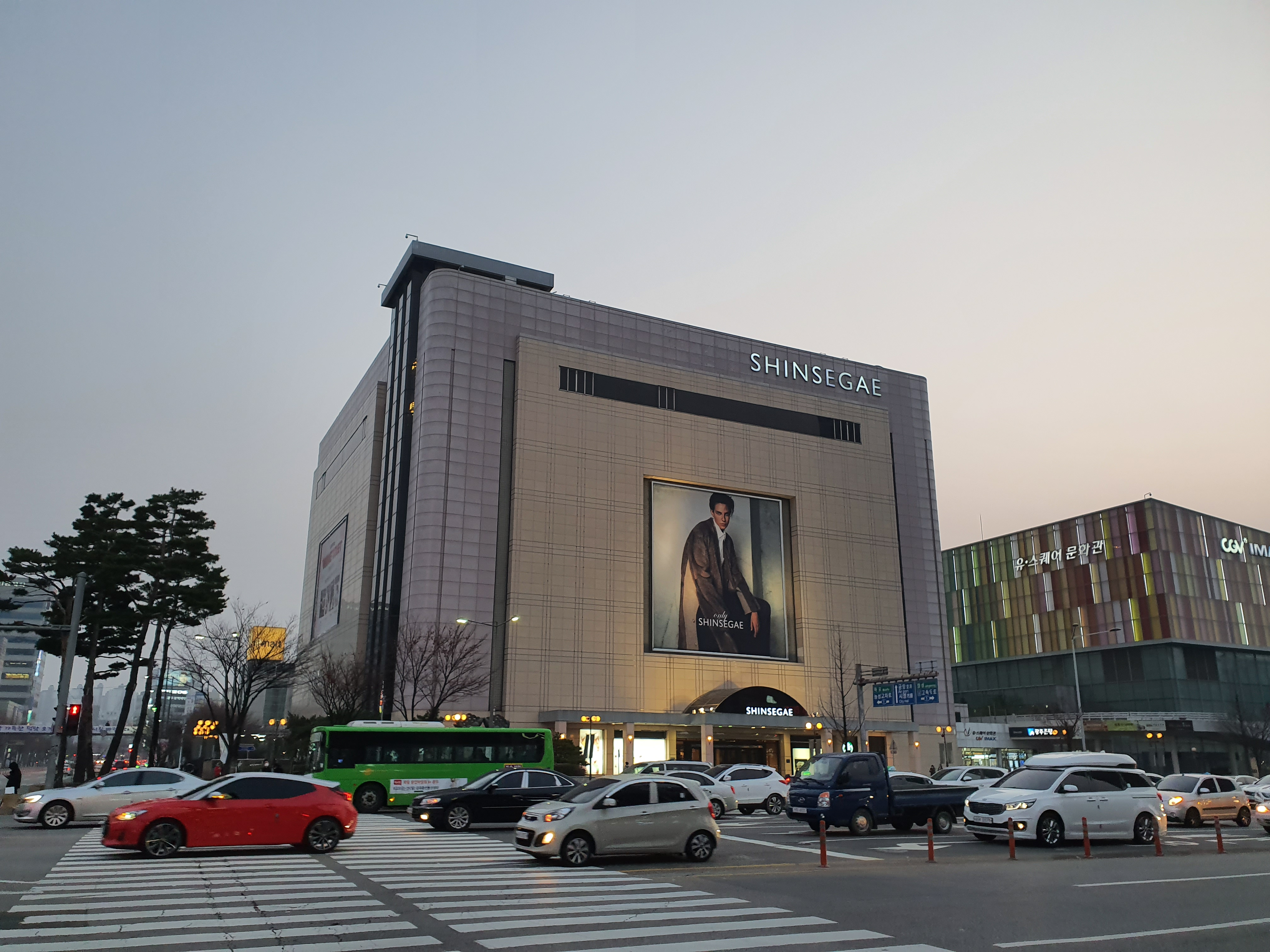 광주광역시에 있는 신세계 백화점